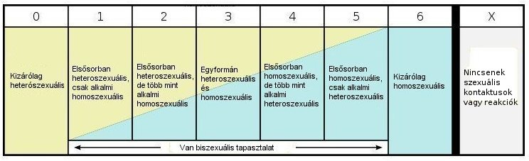 Kinsey-Skala sexueller Orientierung